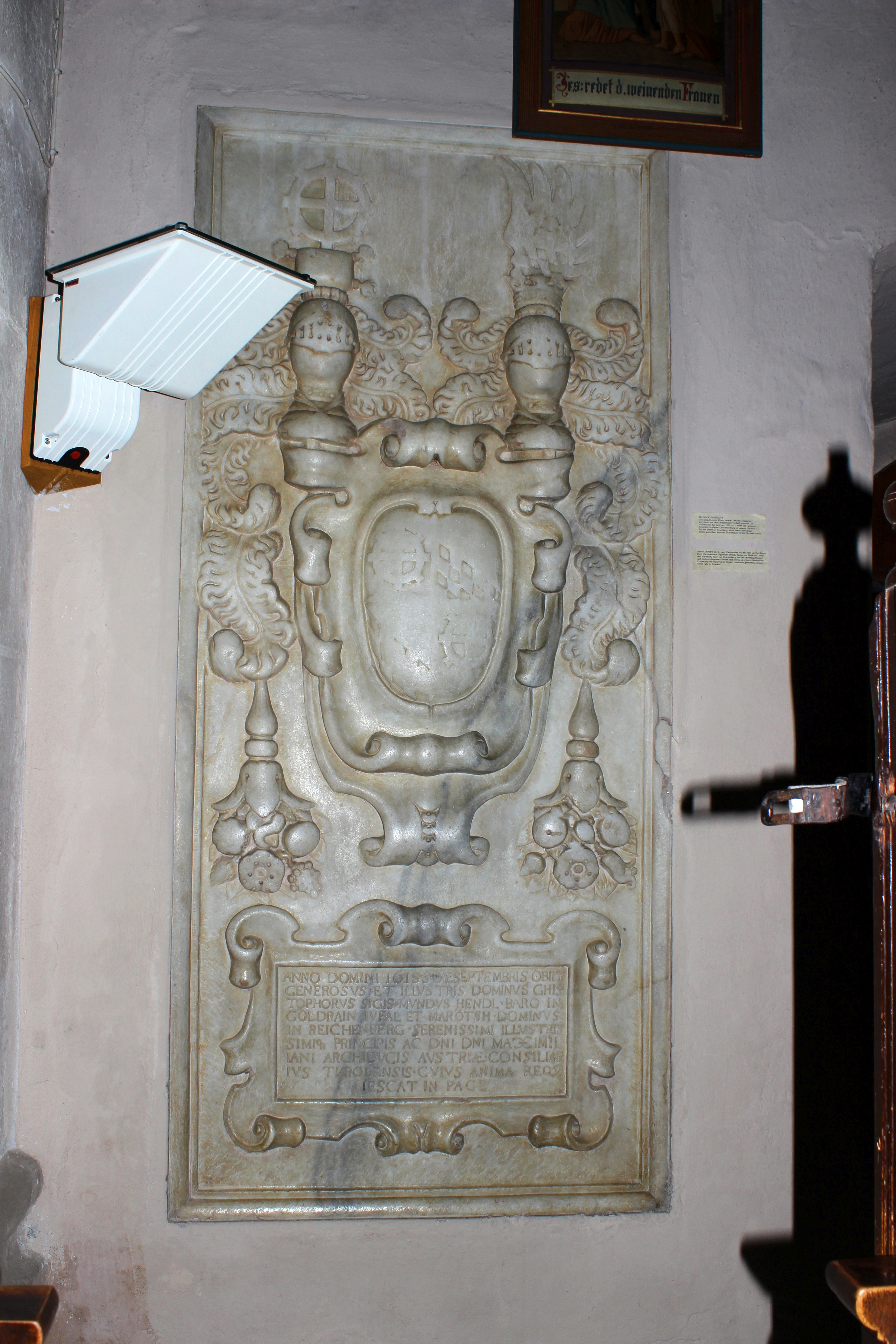 Grabplatte des Chistoph Sigismund Hendl in der Pfarrkirche St. Martin in Tschars